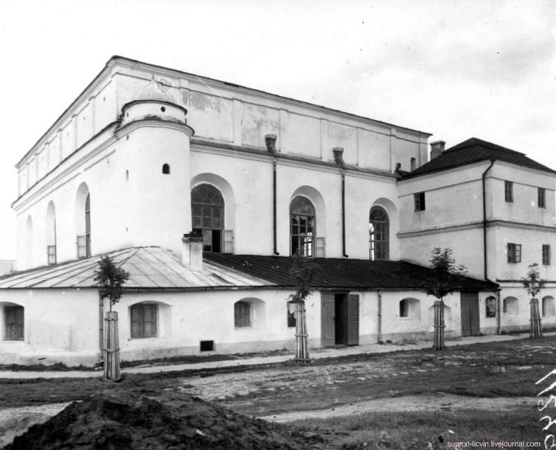 Синагога в Пинске